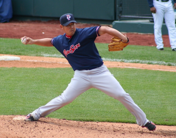 Daisuke Matsuzaka